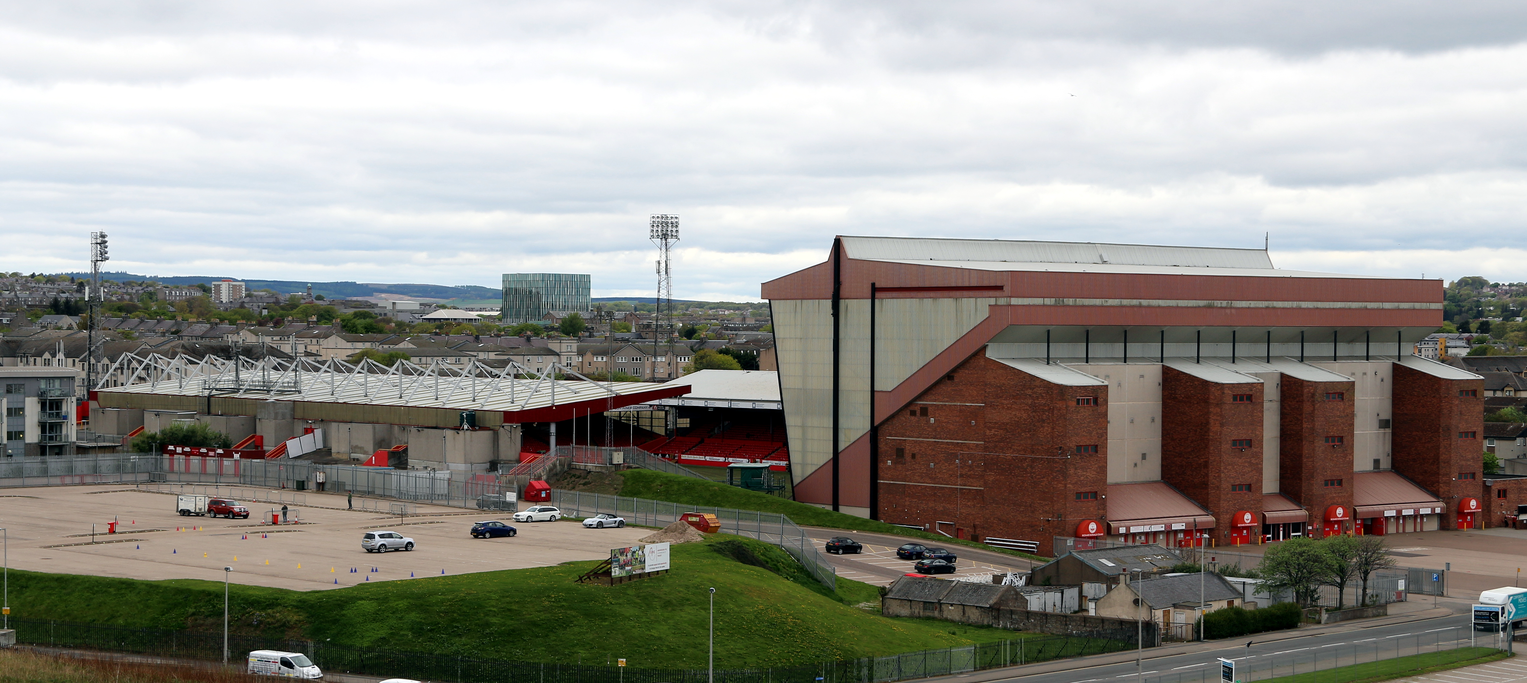 Pittodrie Stadium in Aberdeen, Scotland.